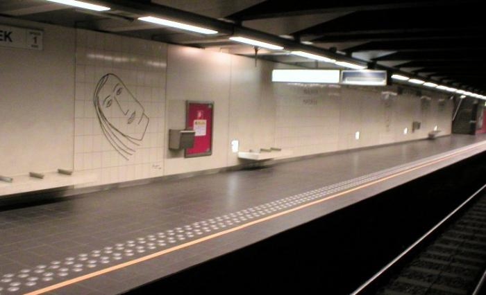 Quais de la station Maalbeek